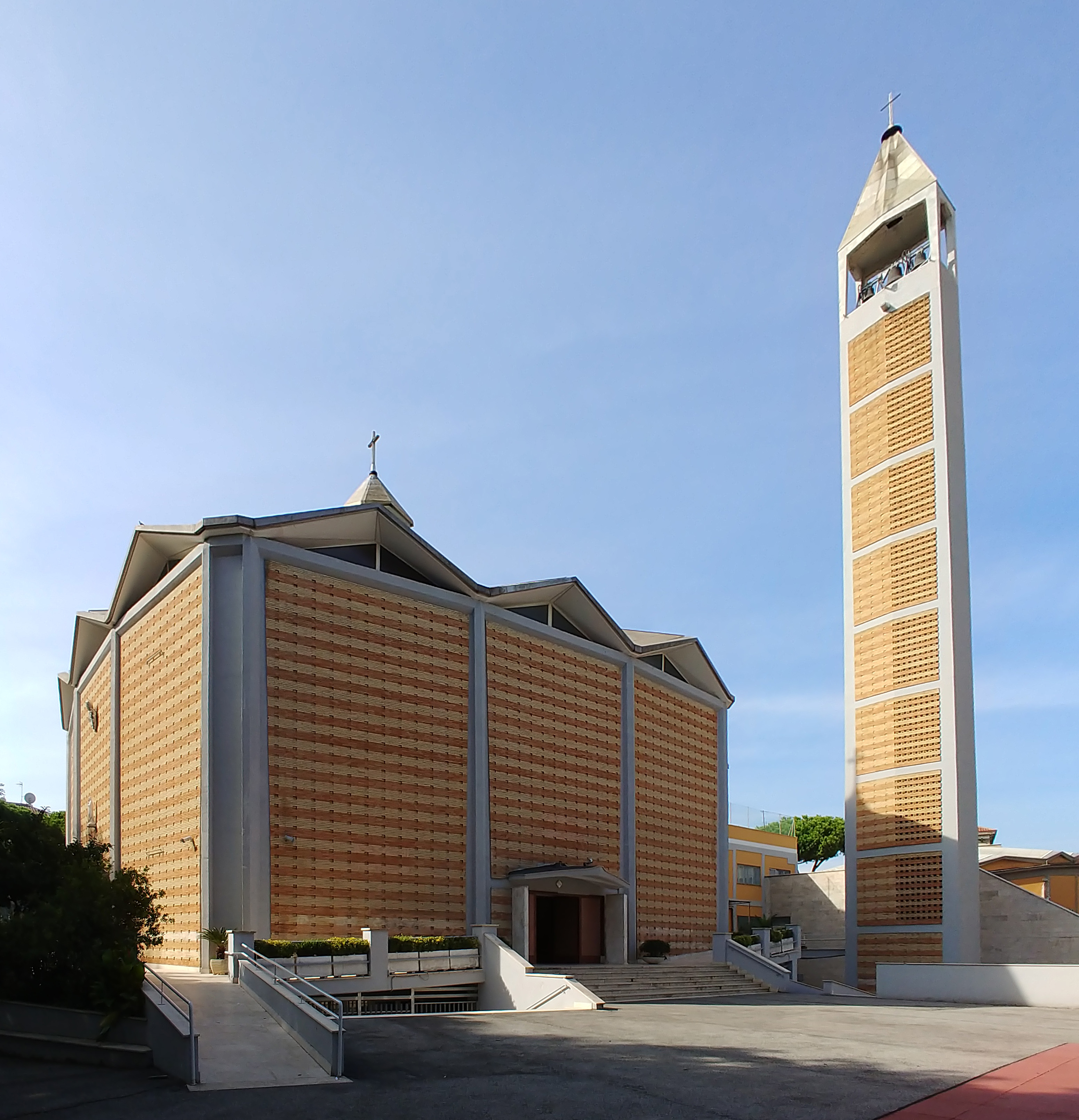 Fianco destro e campanile.